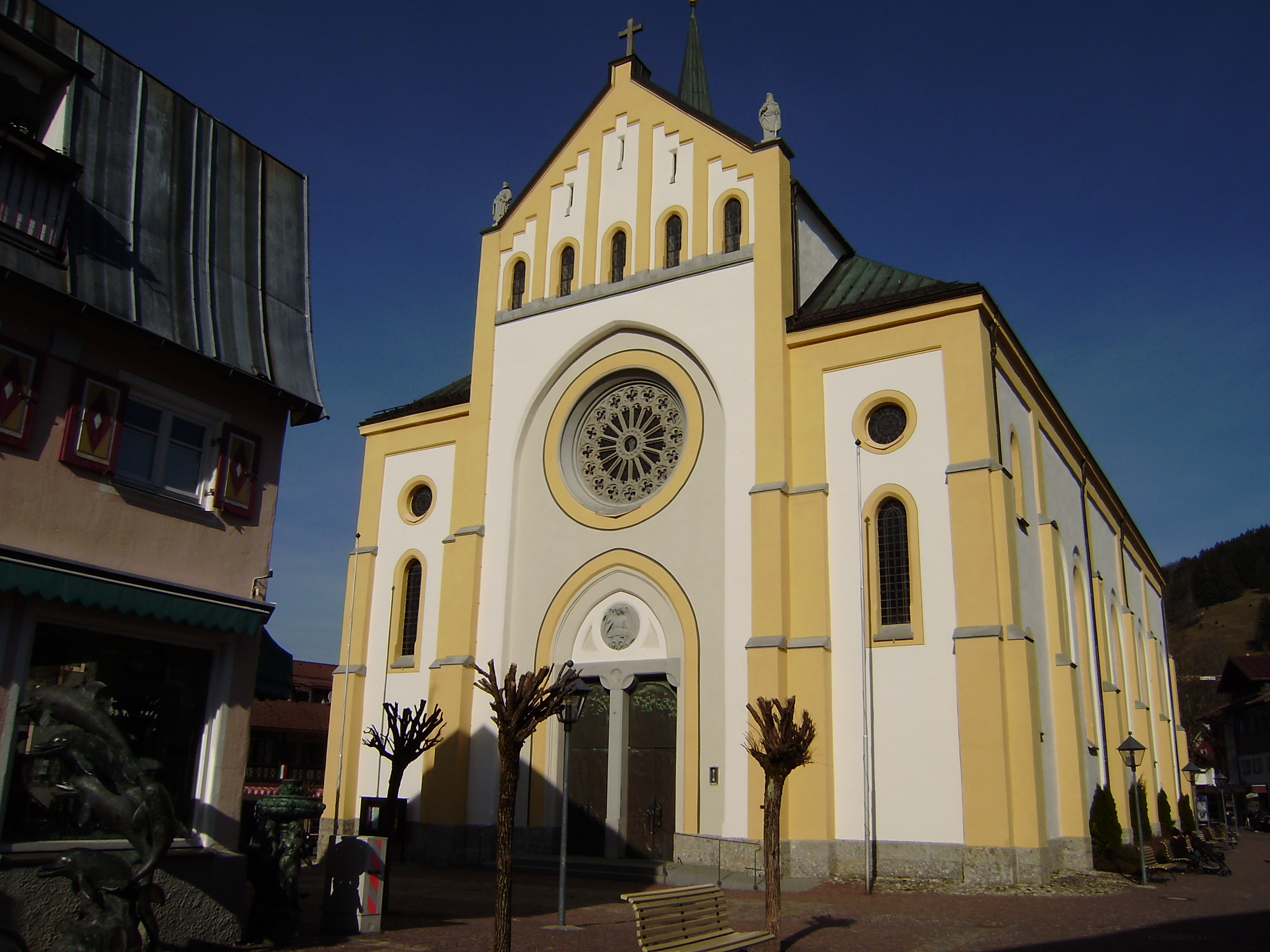 St Peter und Paul, Oberstaufen, Hauptportalseite von W